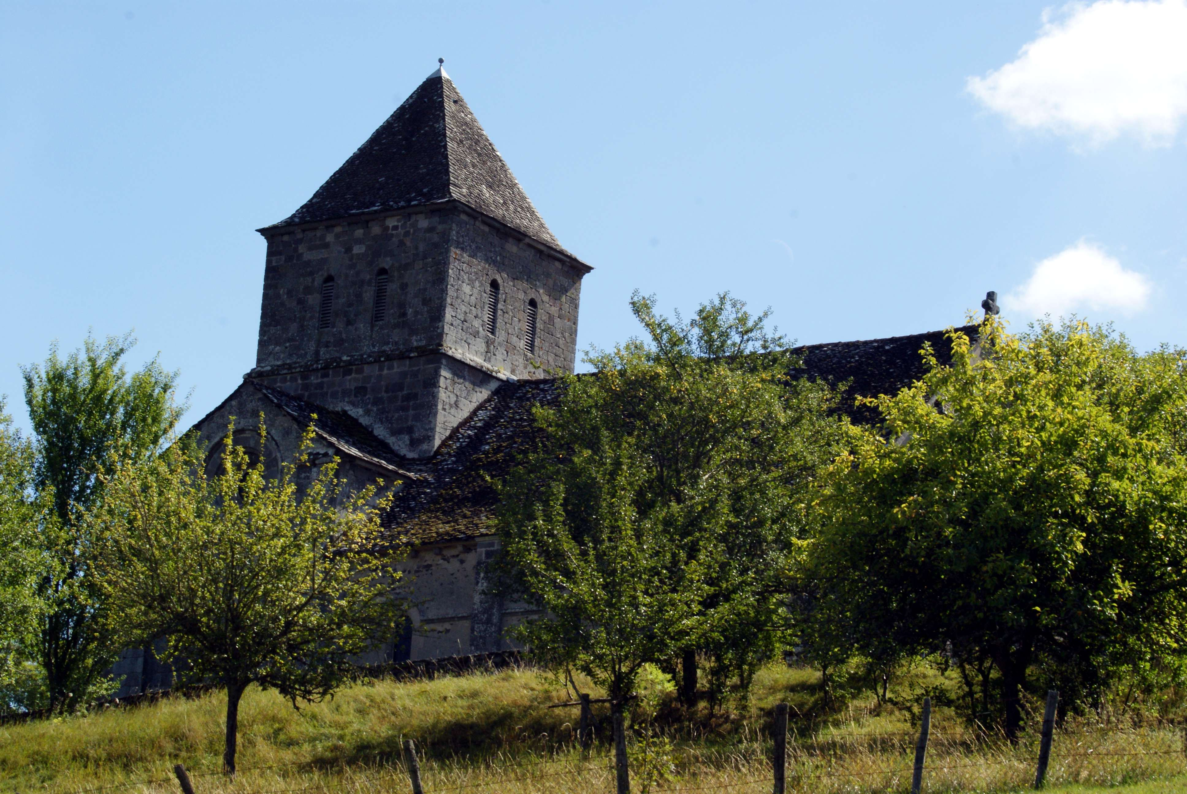 Église Saint-Thibaud de Brageac